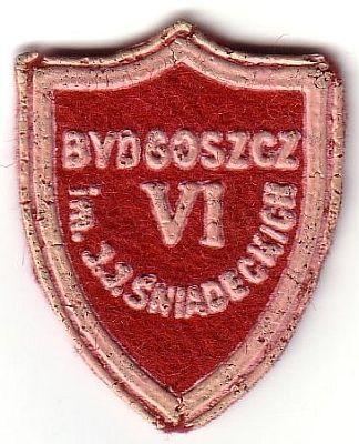 Tarcza VI Liceum Ogólnokształcącego w Bydgoszczy